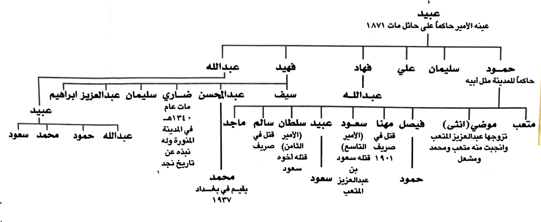 Аҧсшәа: OBAID BIN RASHID FAMILY